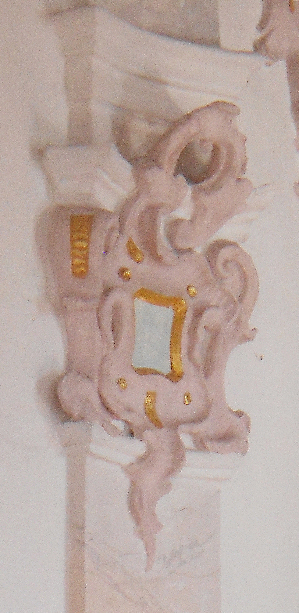 Kapitell eines Pilasters in Heilig Kreuz (Mindelaltheim)